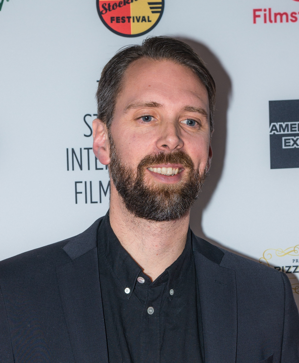 Jesper Ganslandt på röda mattan inför prisutdelningen på Stockholms internationella filmfestival den 16 november 2018.